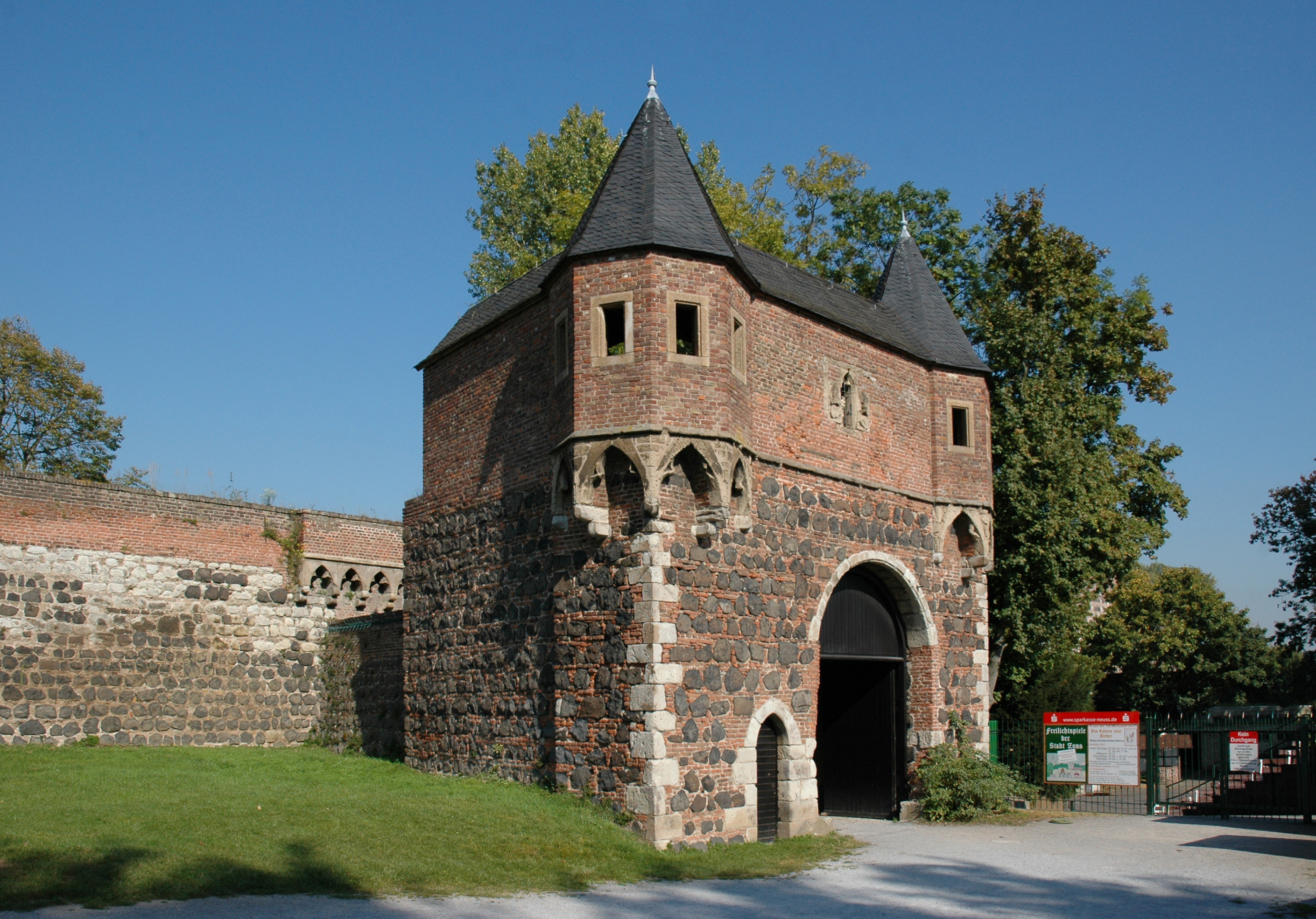 Burg Friedestrom in Dormagen-Zons, Südtor